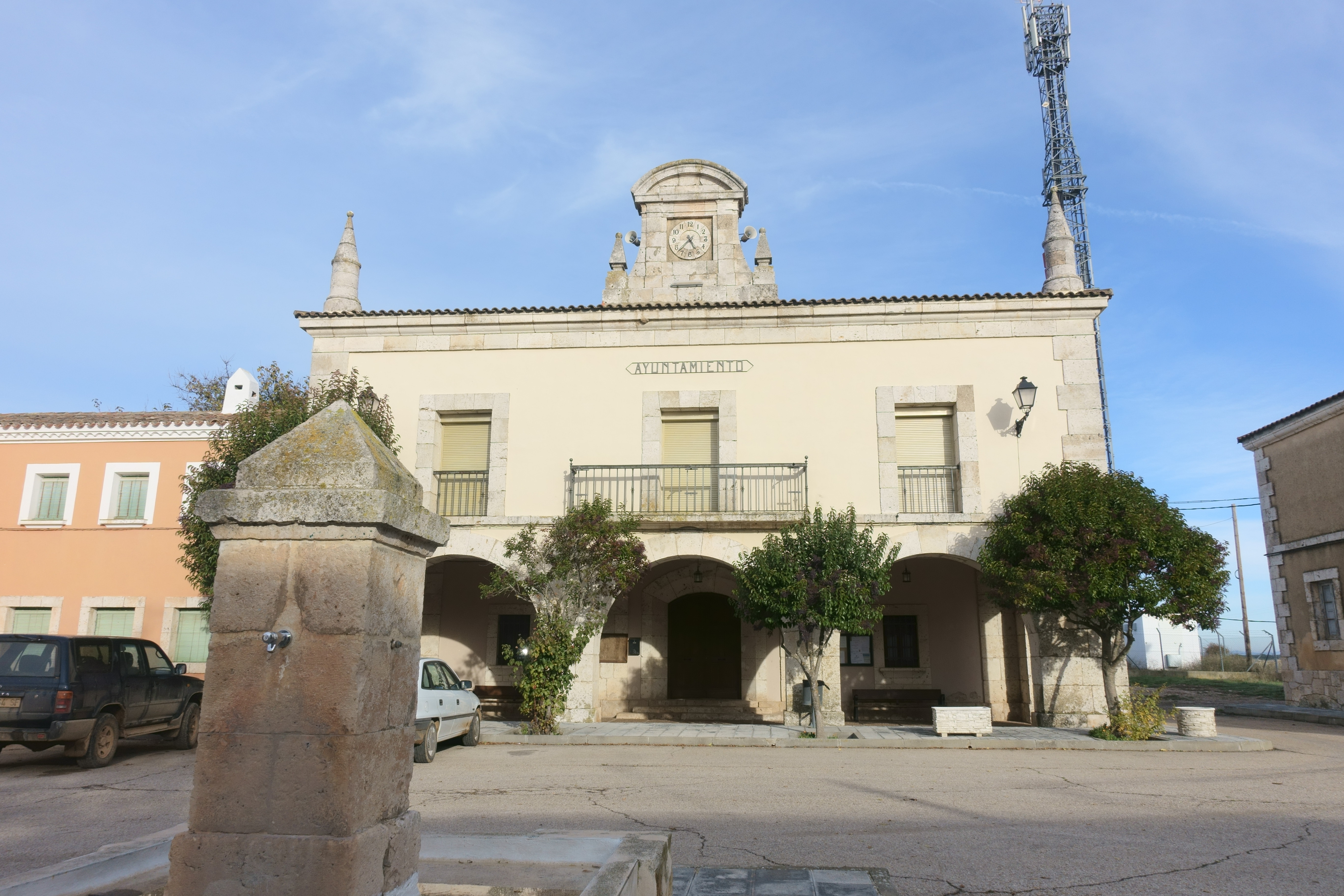 Casa consistorial de Gajanejos (Guadalajara, España).